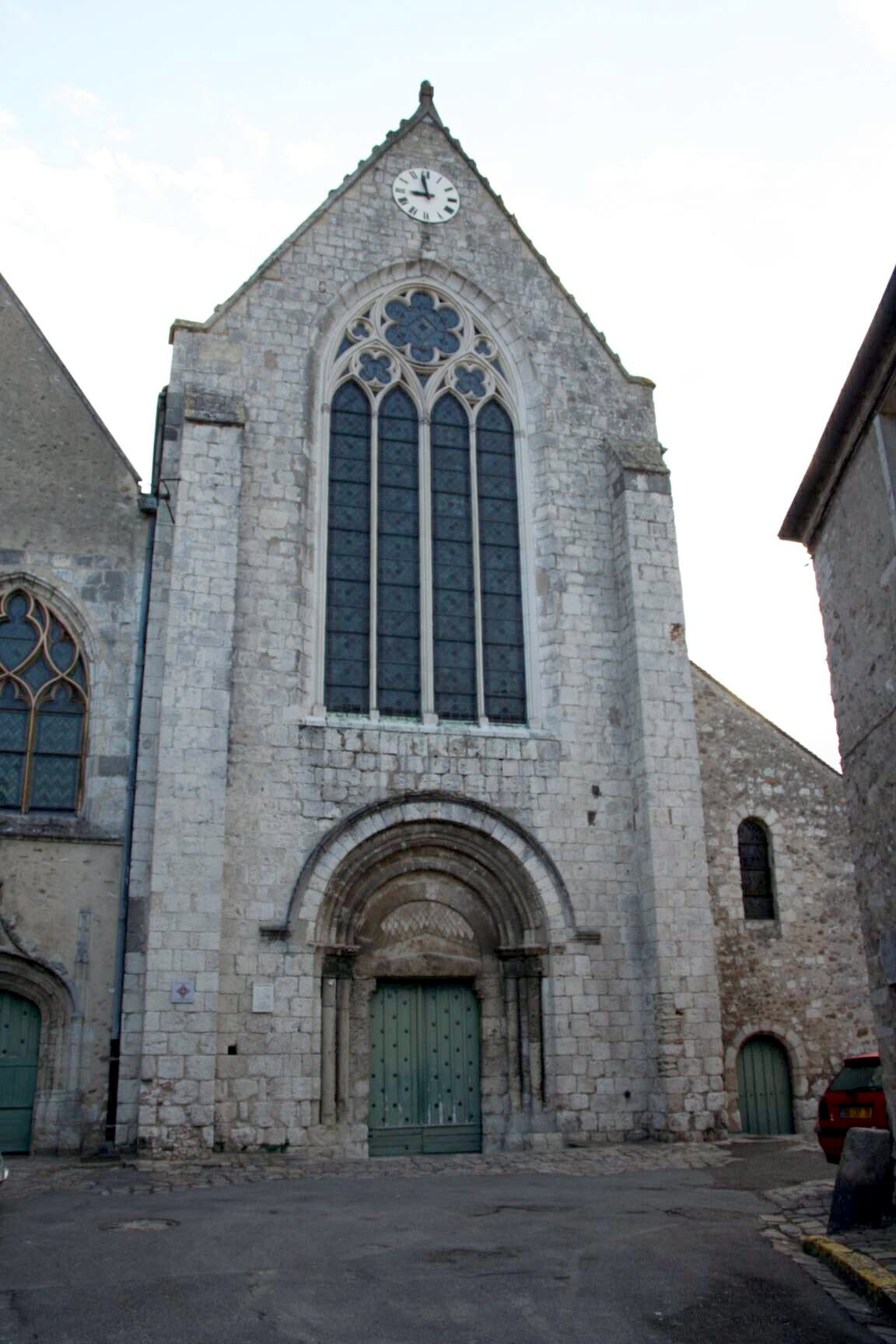 Église de Saint-Arnoult-en-Yvelines - Yvelines (France)